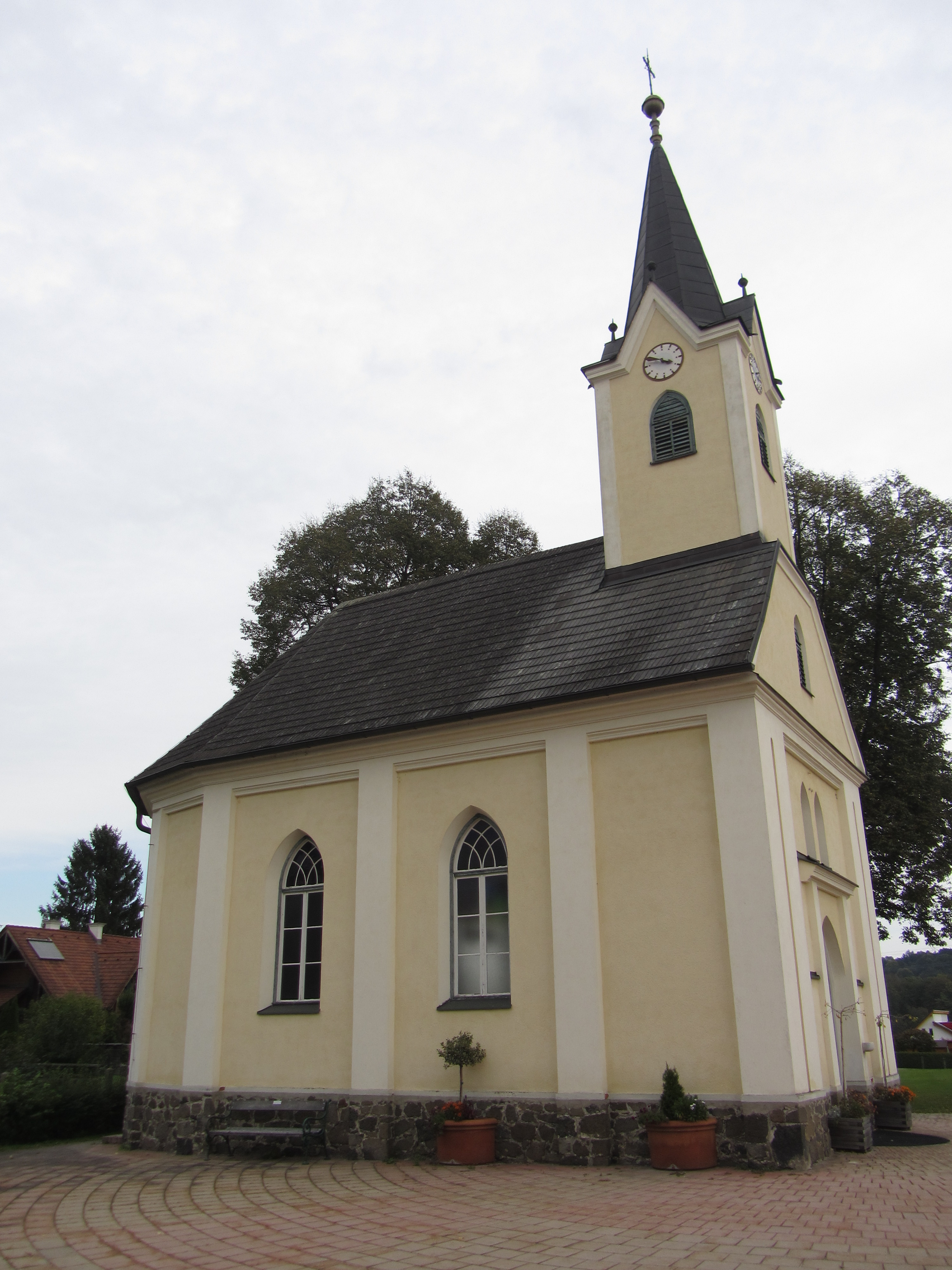 Ortskapelle Werndorf